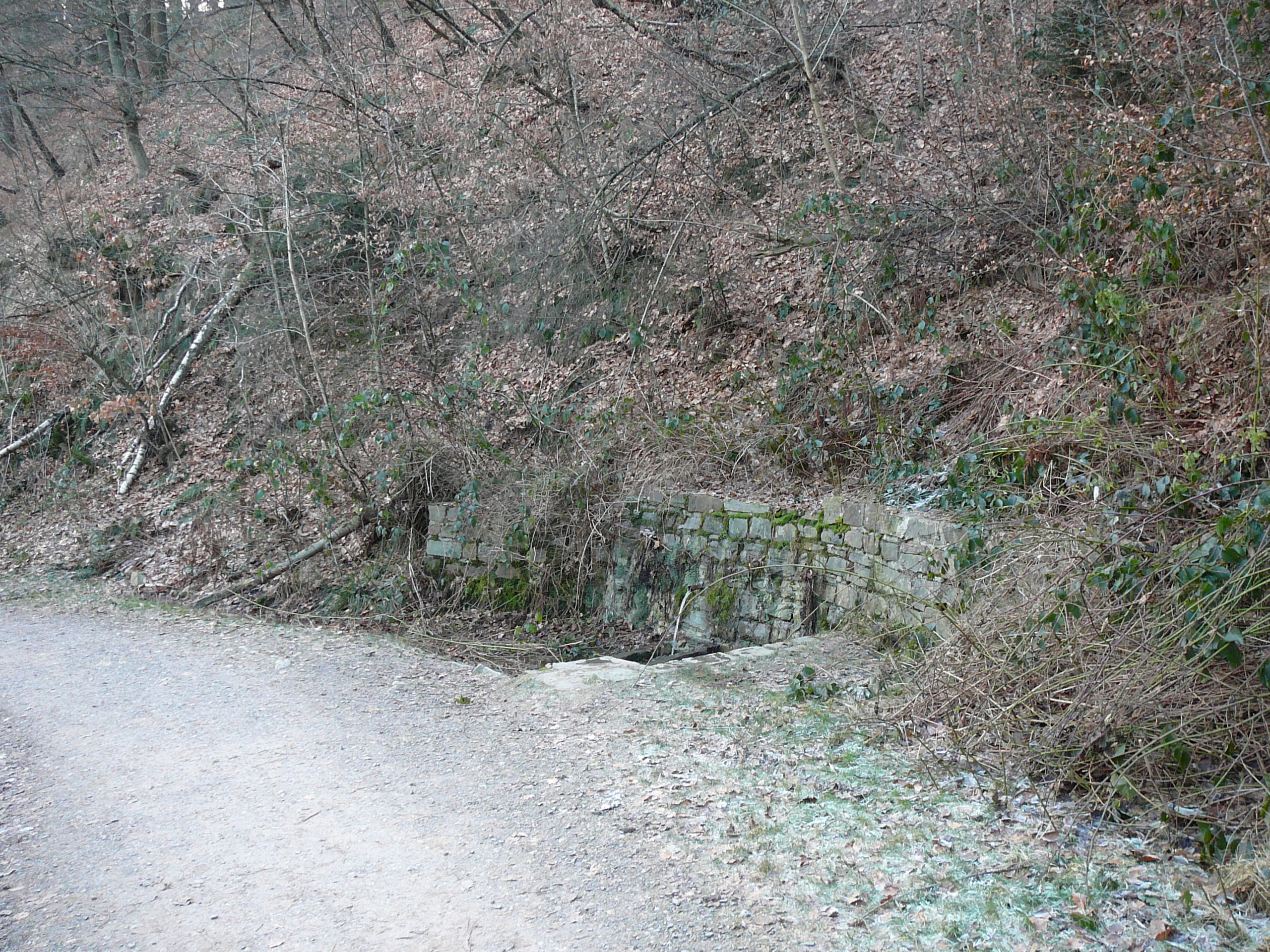 Boltenheide, Wuppertal